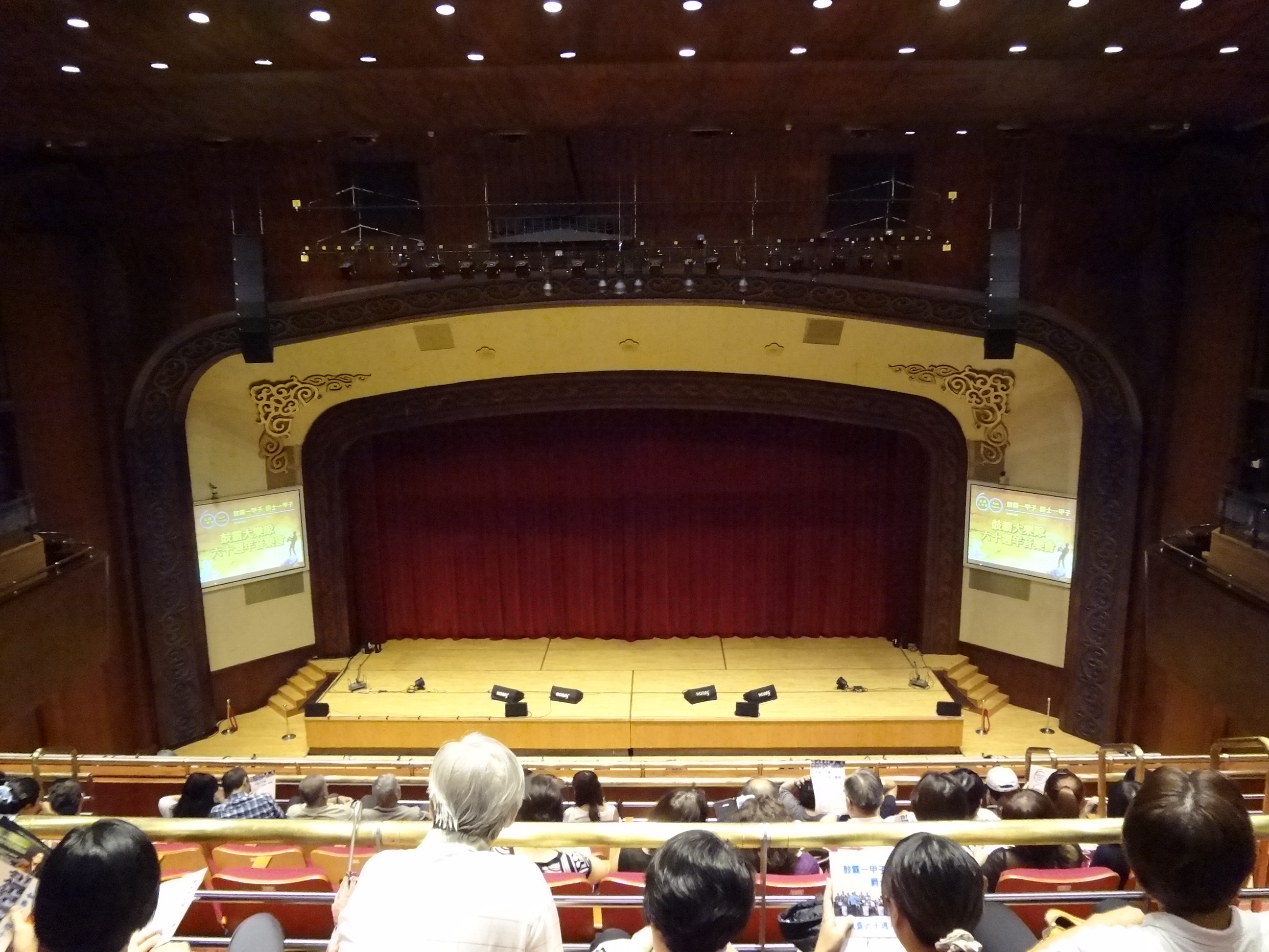 臺北市中山堂中正廳舞臺區。